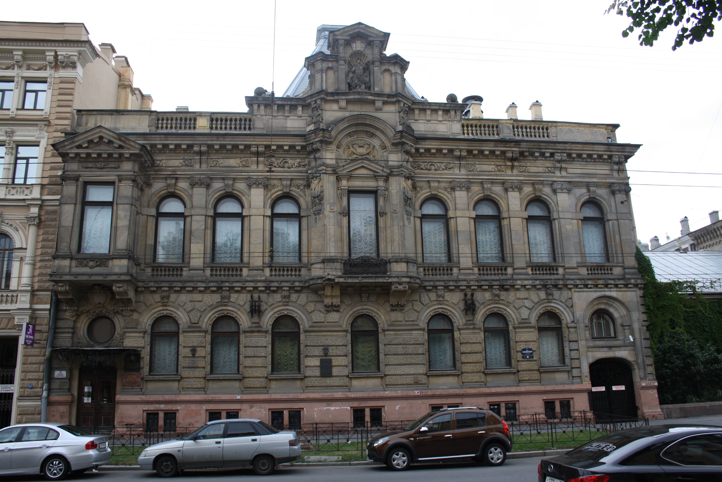 Особняк Кельха А. Ф. (Александрова И. М.) с дворовыми флигелями (Санкт-Петербург и Лен.область, Санкт-Петербург, Чайковского улица, 28)